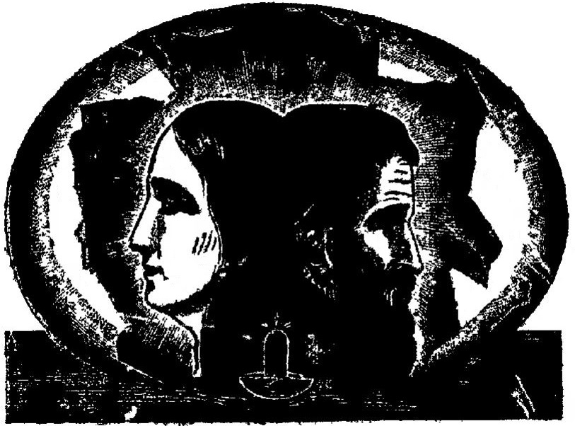 Symbole èvadiste représentant l'androgyne Èvadam, personnification de l'unité dans la dualité et de la préséance de la femme, par le mariage de Marie-Ève, unité génésiaque femelle, et de Christ-Adam, unité génésiaque mâle.